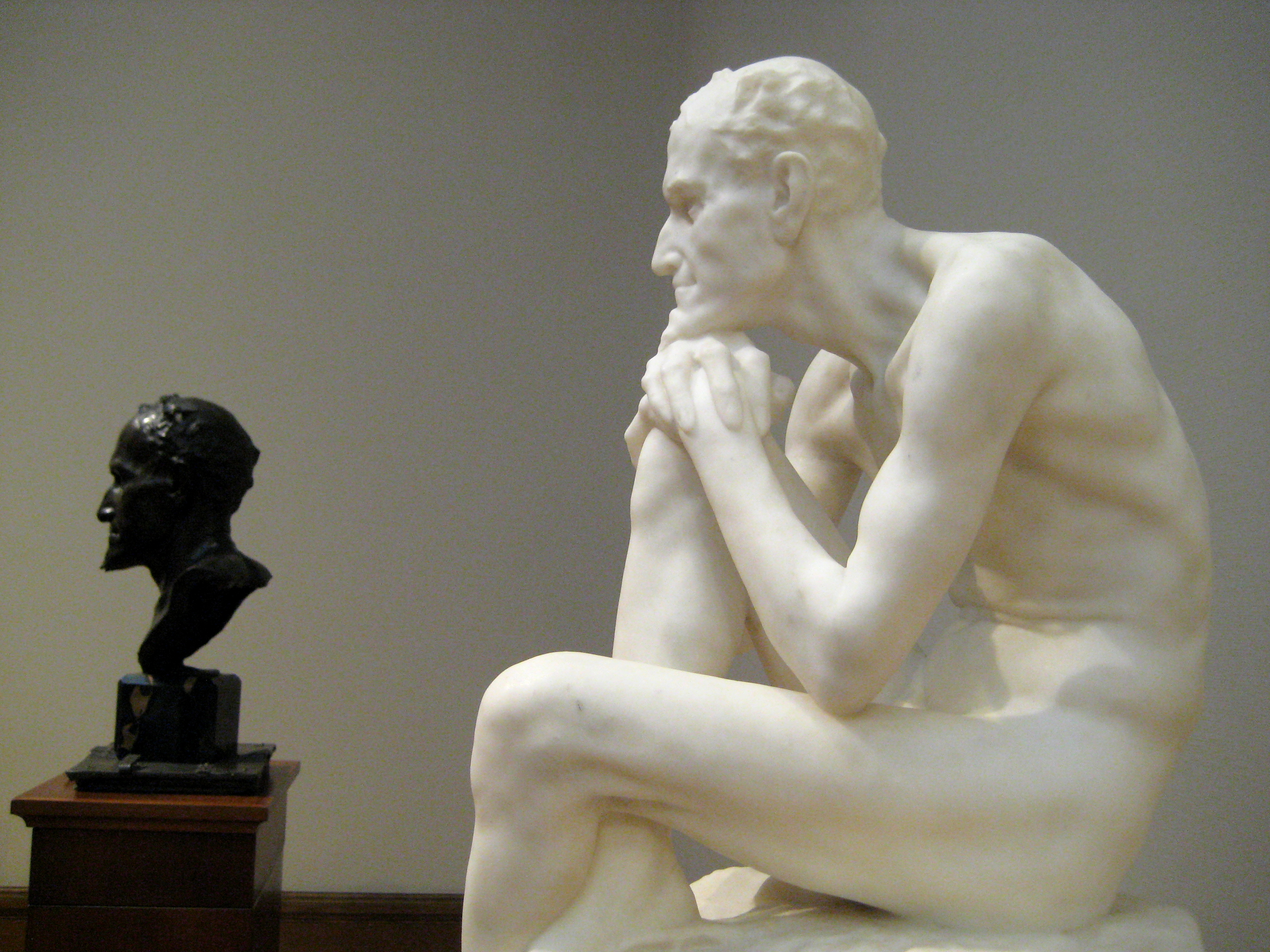 Марк Антокольский. "Мефистофель". После 1883 года. Мрамор. ГТГ. Уменьшенное повторение статуи 1883 года из собрания ГРМ.